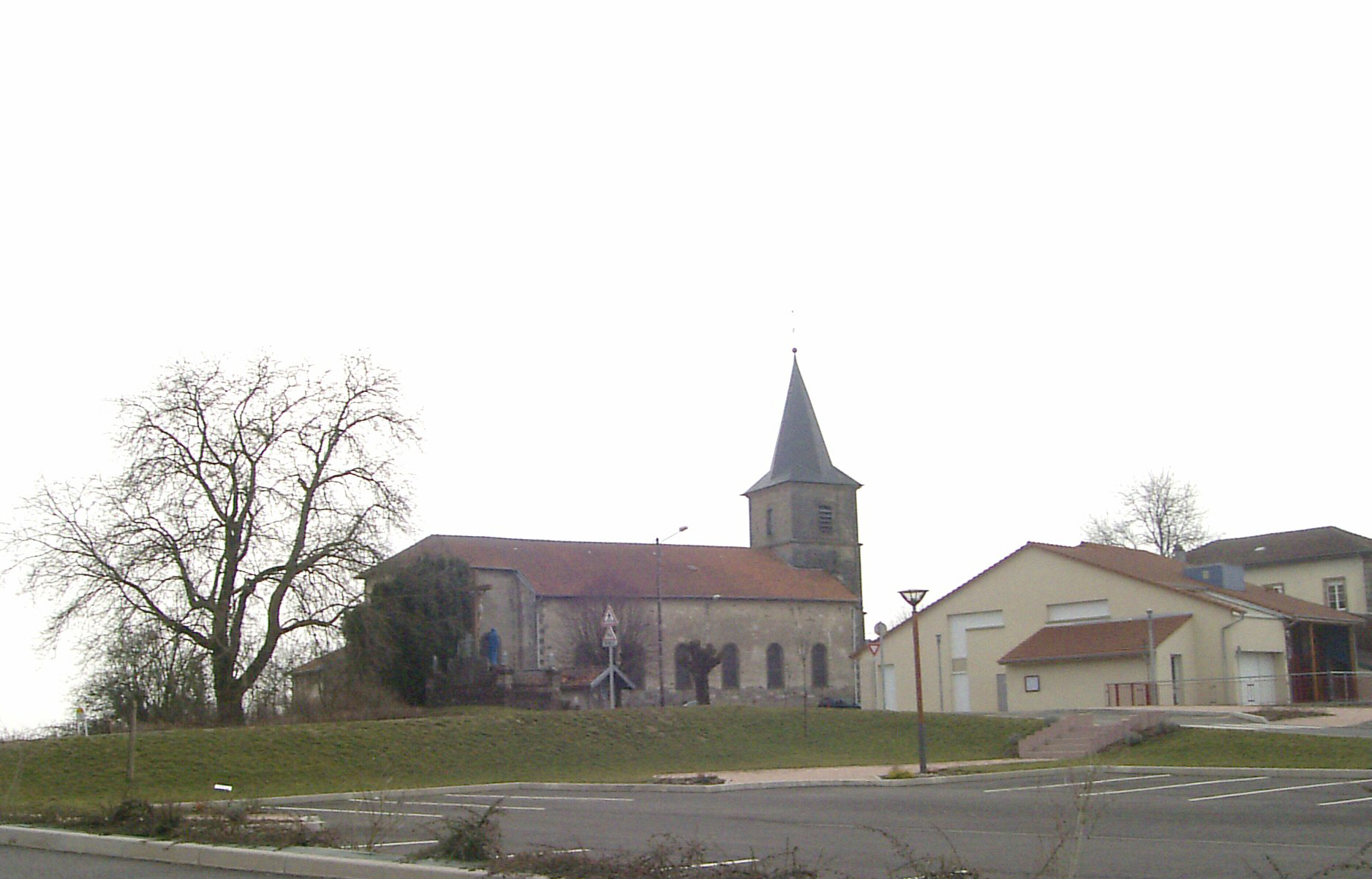 L'église Saint-Èvre d'Harol